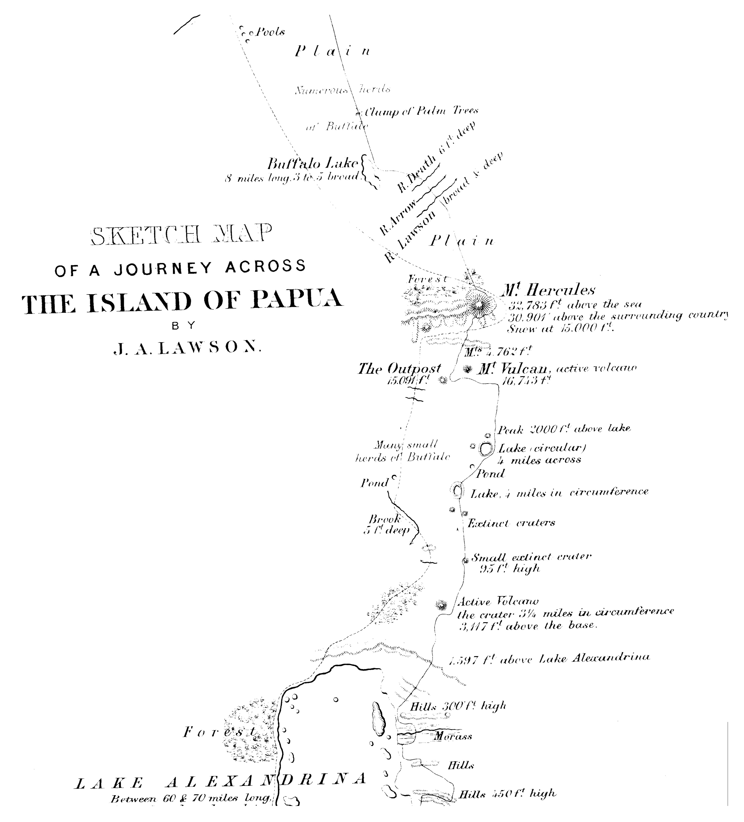 Carte du voyage en Nouvelle-Guinée de J. A. Lawson, publié en 1875 et figurant le mythique mont Hercules